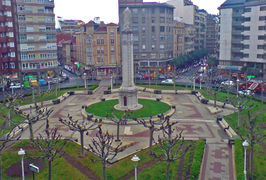 Plaza de la Inmaculada de León desde un edificio aledaño a la misma.